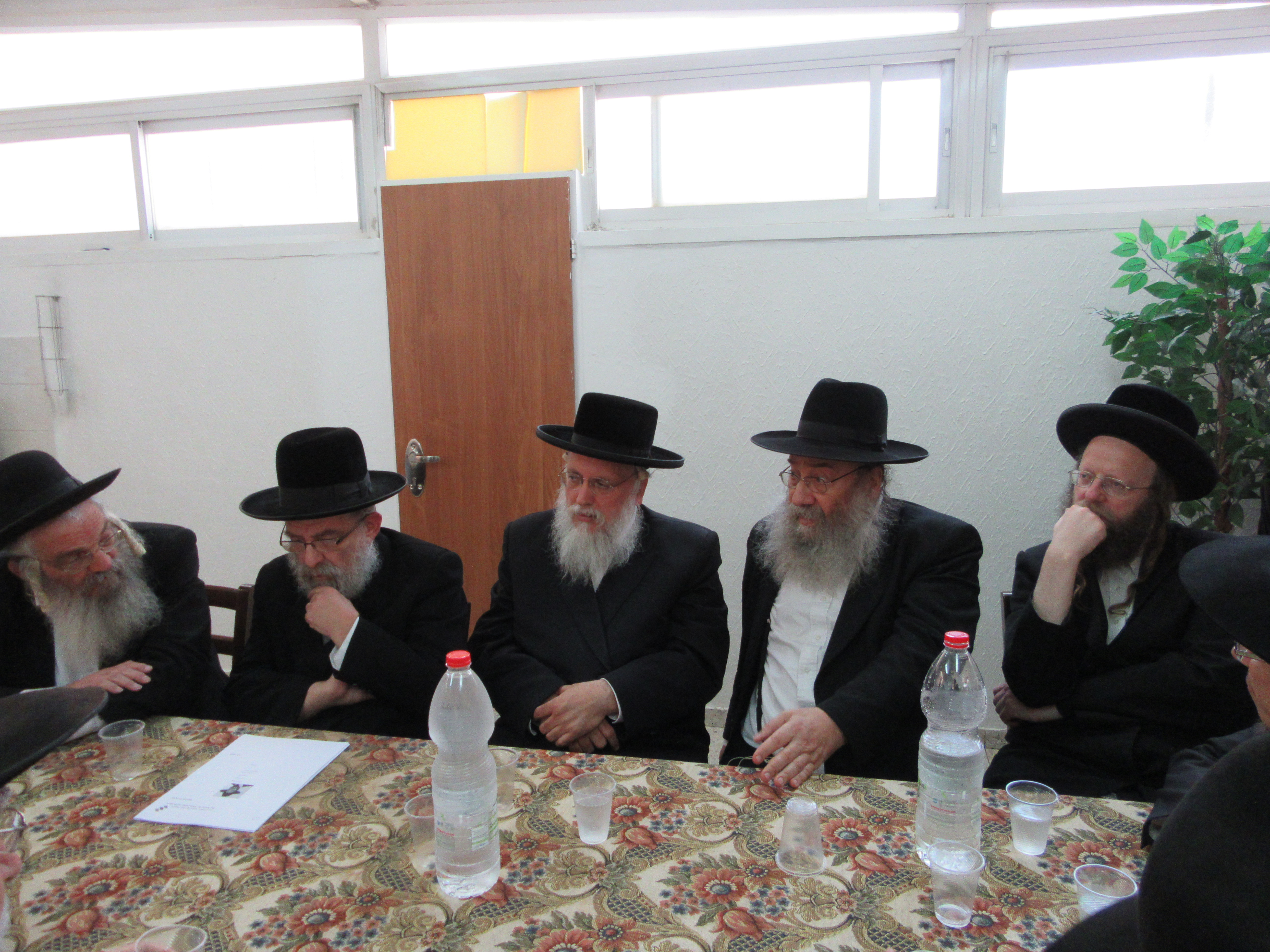 רבנים בשכונת רמת שלמה: הרב שמחה רבינוביץ, הרב ברוך סולובייצ'יק, הרב מתתיהו דייטש, הרב מרדכי פרידלנדר, הרב זונדל שטרן. אב תשע"ו